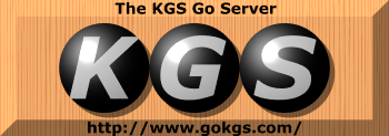 Logo der Internetplattform KGS